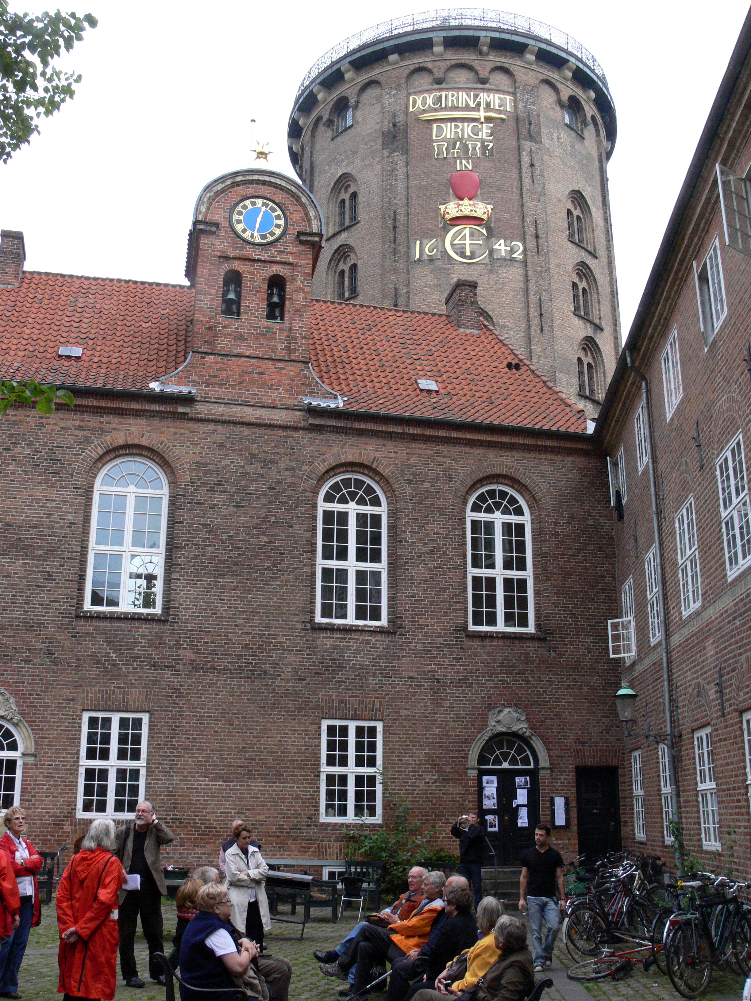 Binnenhof des Studentenwohnheims „Regensen“. Hier wohnten alle isländischen Studenten. Im Hintergrund der "Runde Turm" der Trinitatiskirche. Im Dachstuhl der Kirche befand sich die Universitätsbibliothek. Nebenjob der Studenten: Leichenträger.